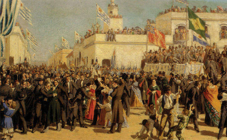 "Boceto para la Jura de la Constitución de 1830" (óleo) del pintor de Uruguay Juan Manuel Blanes (1830 - 1901).